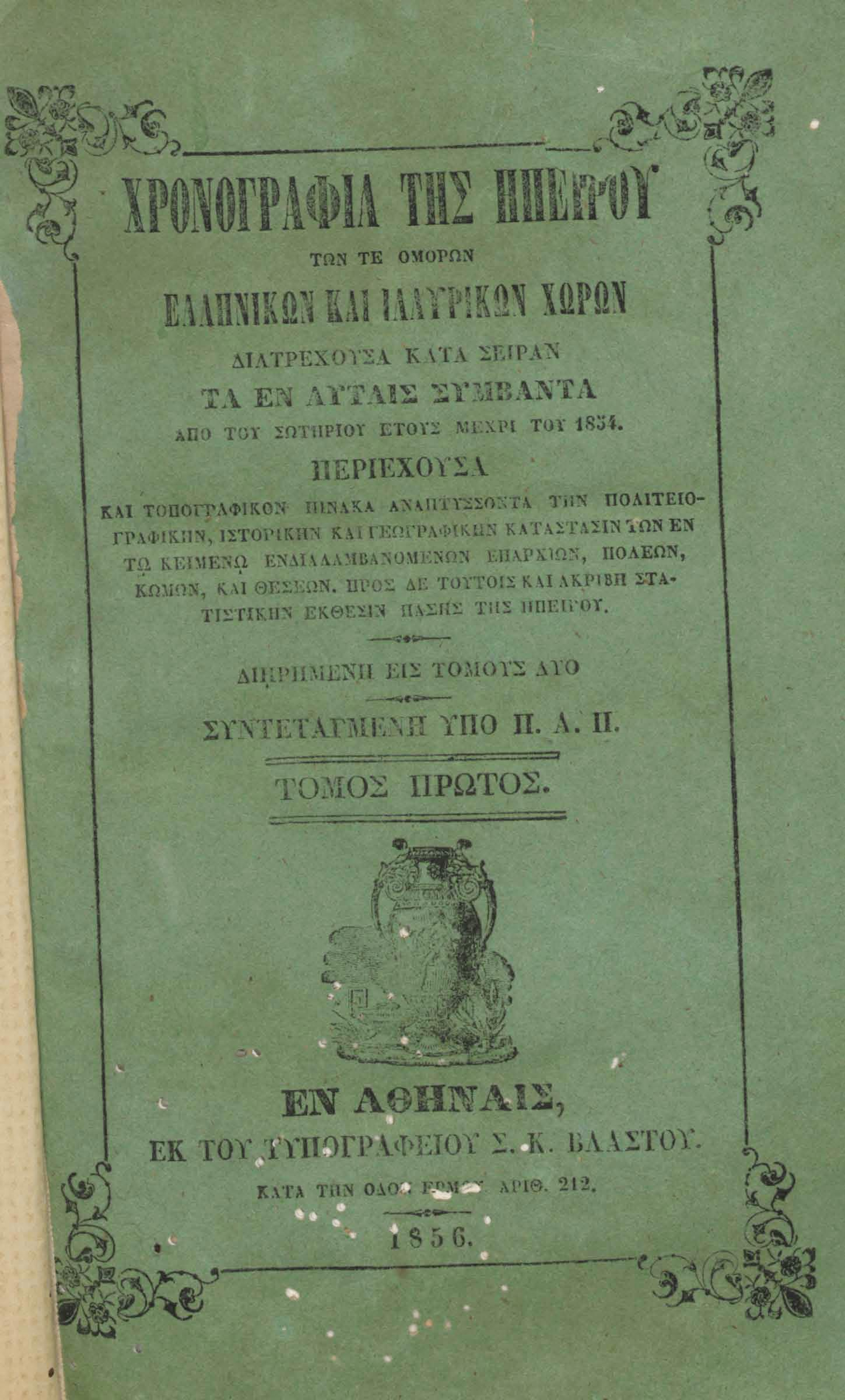 Хронография на Епир